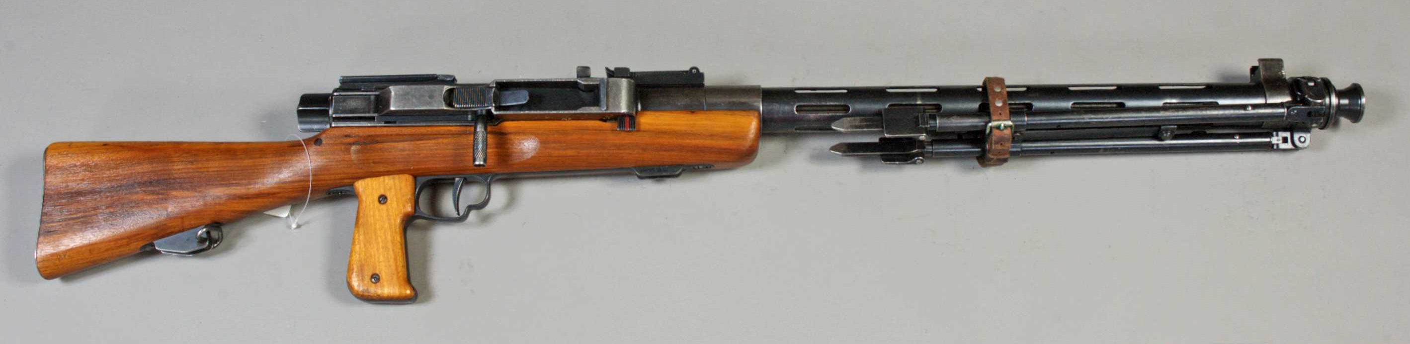 Samhörande nr är 511-599, 700-701 (532-536): 1 kulsprutegevär, 1 gevärsrem, 1 benstöd. Kaliber: 7,5 mm (patron m/1911). Eldhastighet: 450 skott/minut.